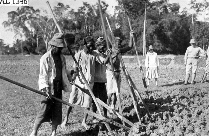 Repronegatief. Omwerken van de grond met stokken, Toba Bataklanden